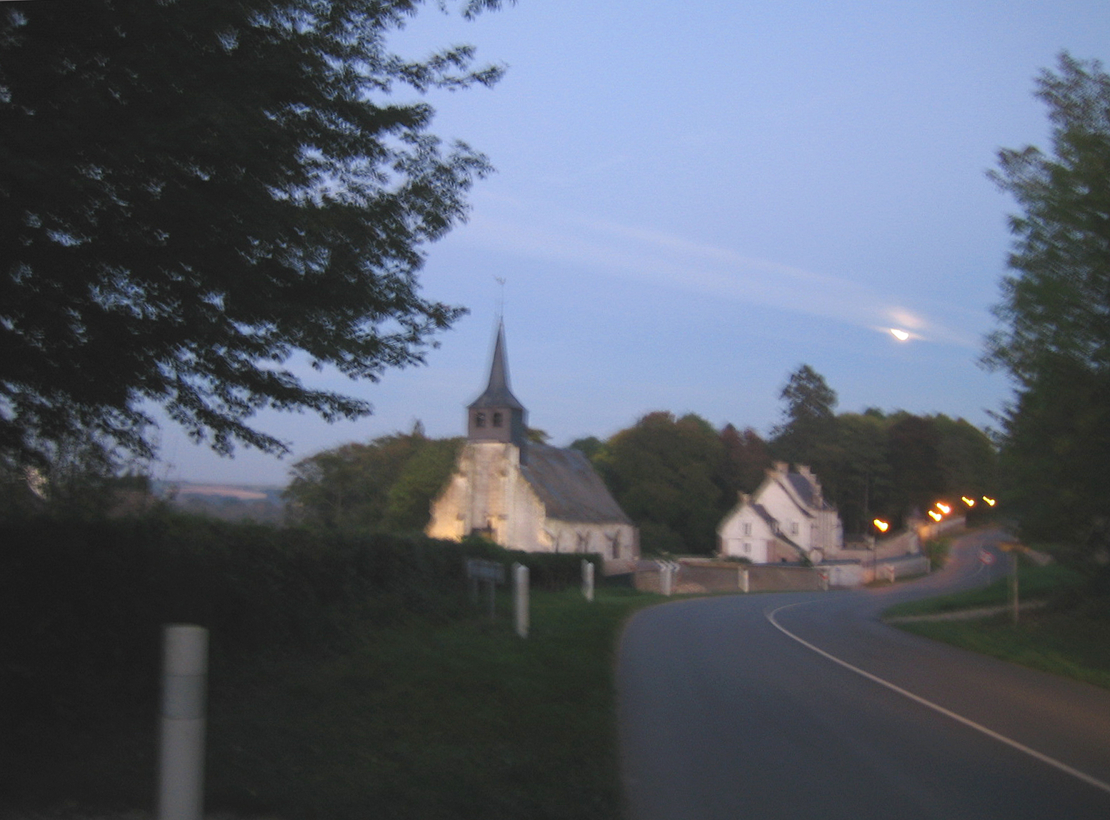 Vieulaines, petit village désormais intégré à la commune de Fontaine-sur-Somme (Somme, France) (Photo floue qui devra être refaite !)